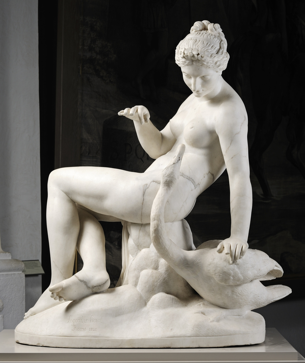 Léda